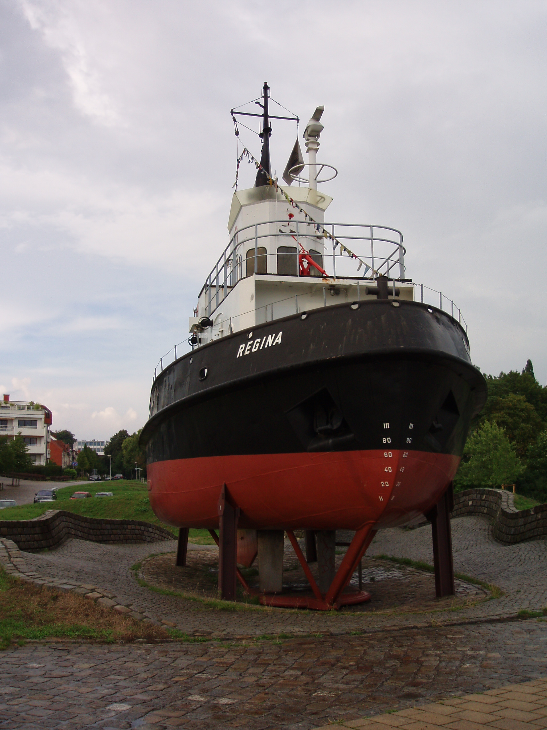 an der Weserpromenade: Schlepper Regina, gebaut von der Bremer Vulkan. Länge: 18,45 m, Breite: 6,66 m; Geschwindigkeit: 10,5 kn, Voith-Schneider-Antrieb. Wurde ca. 22 Jahre lang bei Vulkan als Schlepper benutzt, 1988 vom Verein Maritima Tradition übernommen, aufgearbeitet und 1990 an der Weserpromenade aufgestellt. Wird heute als Schaustück und als Vereinsheim der Vereinsjugend benutzt. Seit 2017 Funkstation und Vereinsheim des Deutschen Amateur-Radio-Club (DARC), Rufzeichen DKOMTR